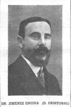 Jimenez Encina, Cristobal 1910